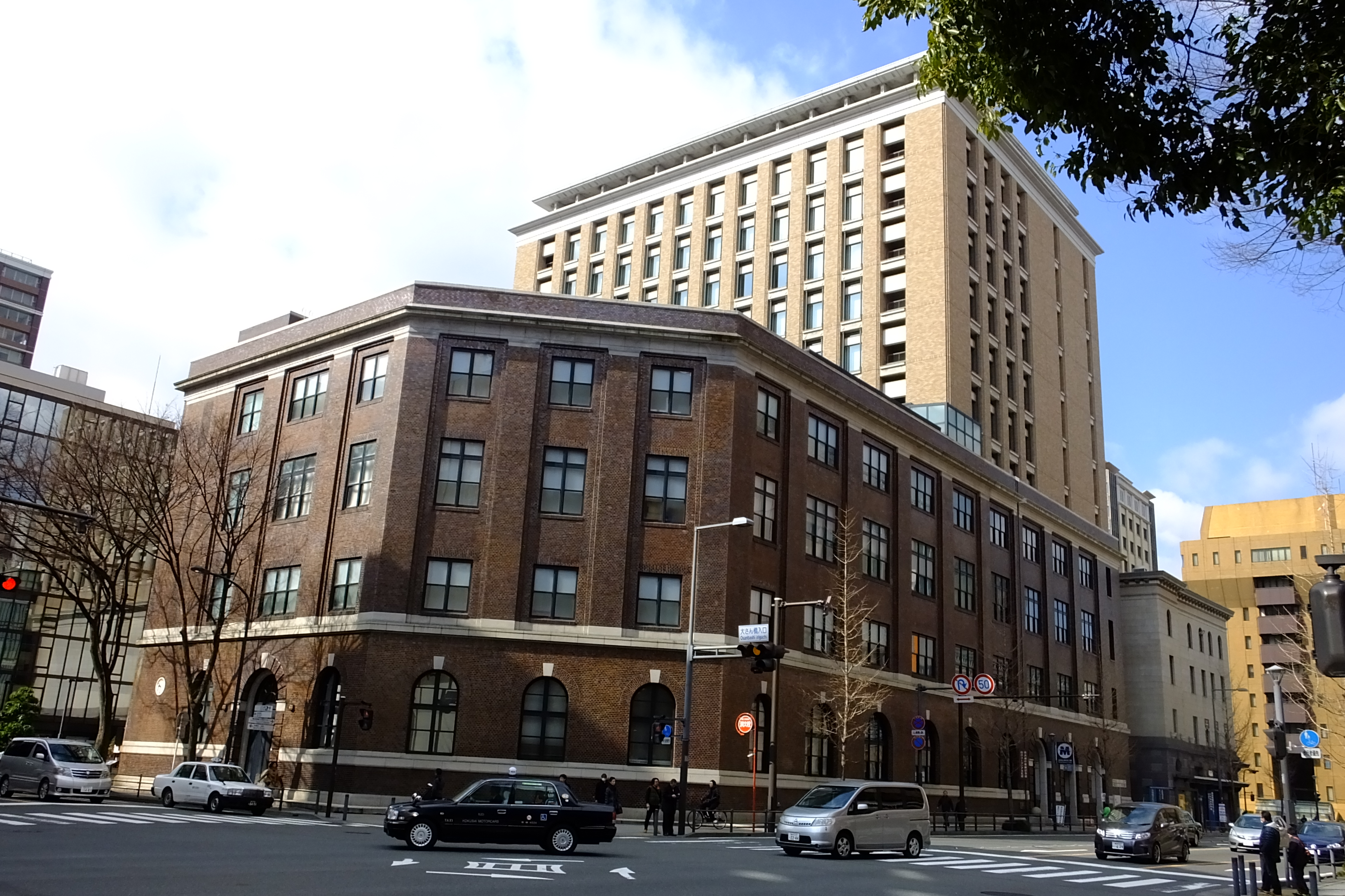 横浜ユーラシア文化館全景